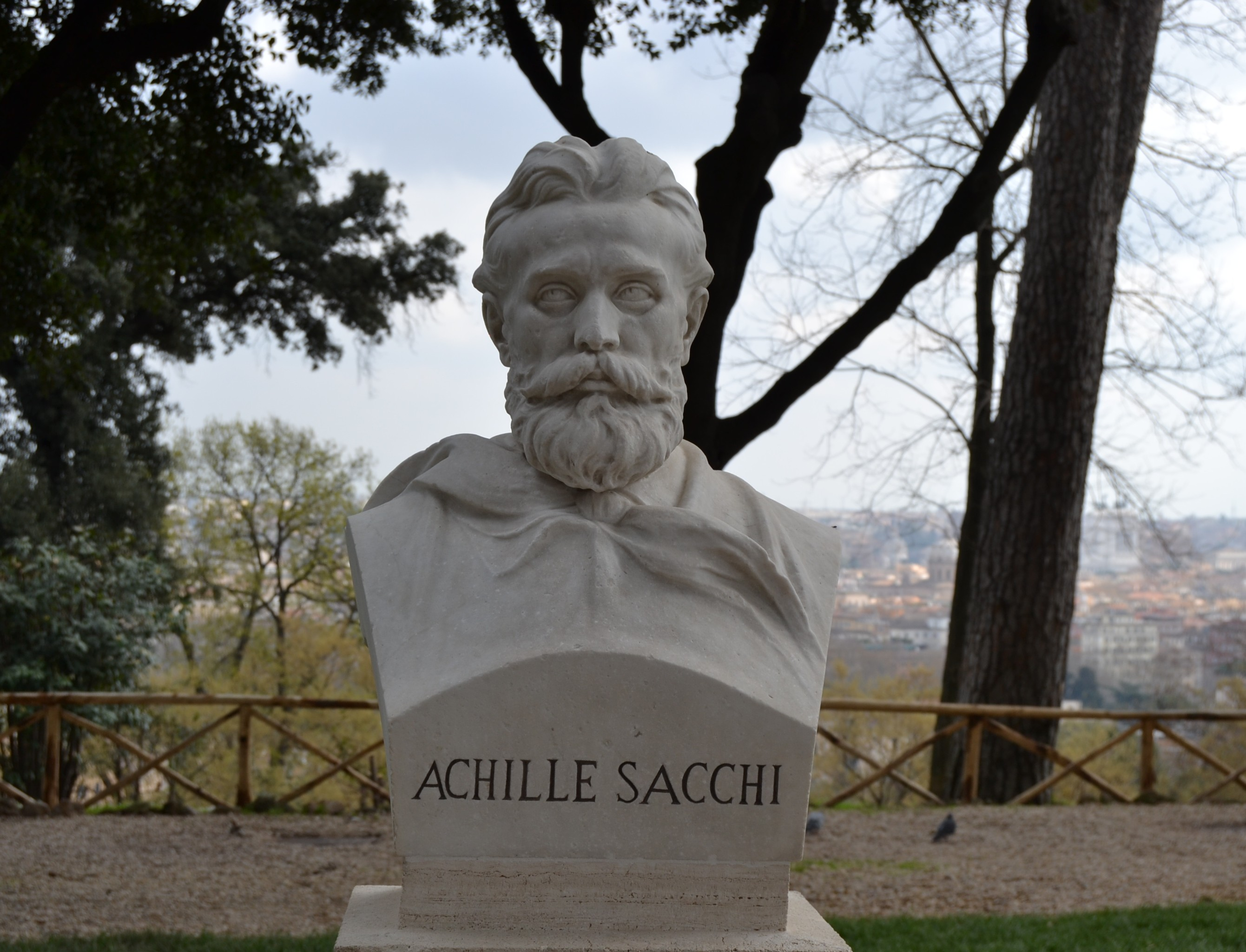 Busto di Achille Sacchi